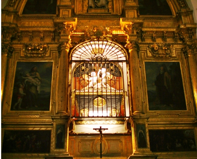 Sepulcre de Santa Teresa de Jesús, al retaule major del monestir carmelita d'Alba de Tormes.